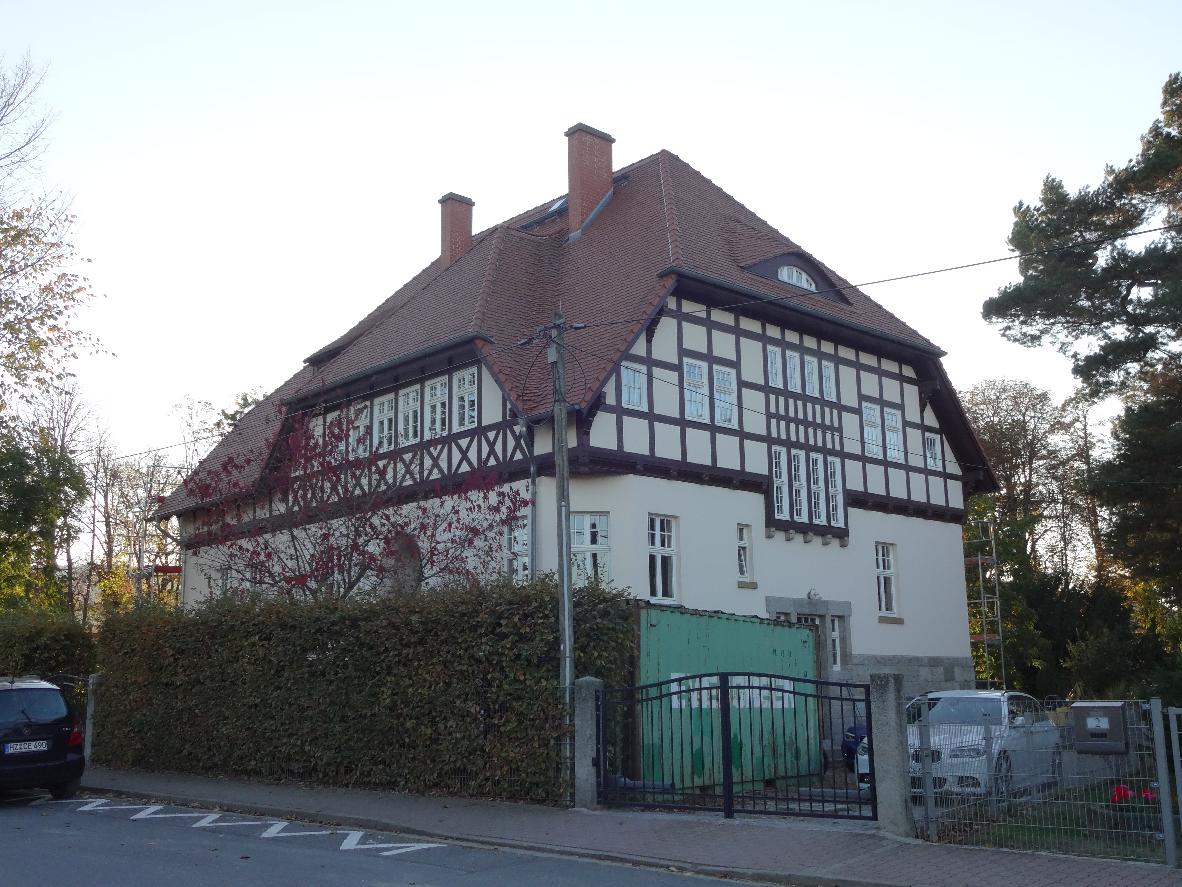 denkmalgeschütztes Wohnhaus Am Park 1 in Darlingerode; Teil der Domäne